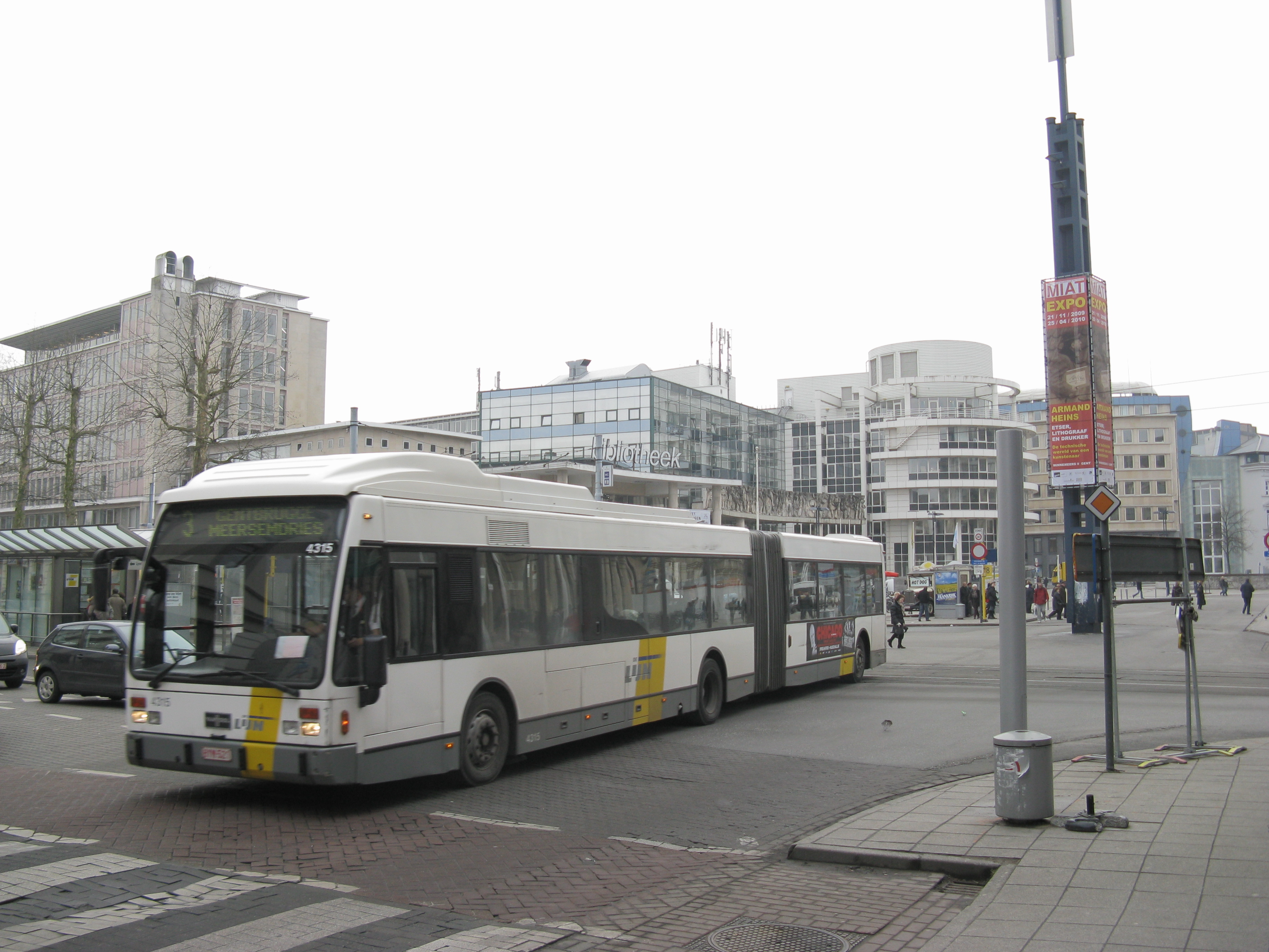 Bus van lijn 3 aan het knooppunt van het openbaar vervoer aan het Woodrow Wilsonplein ('Zuid') in Gent.